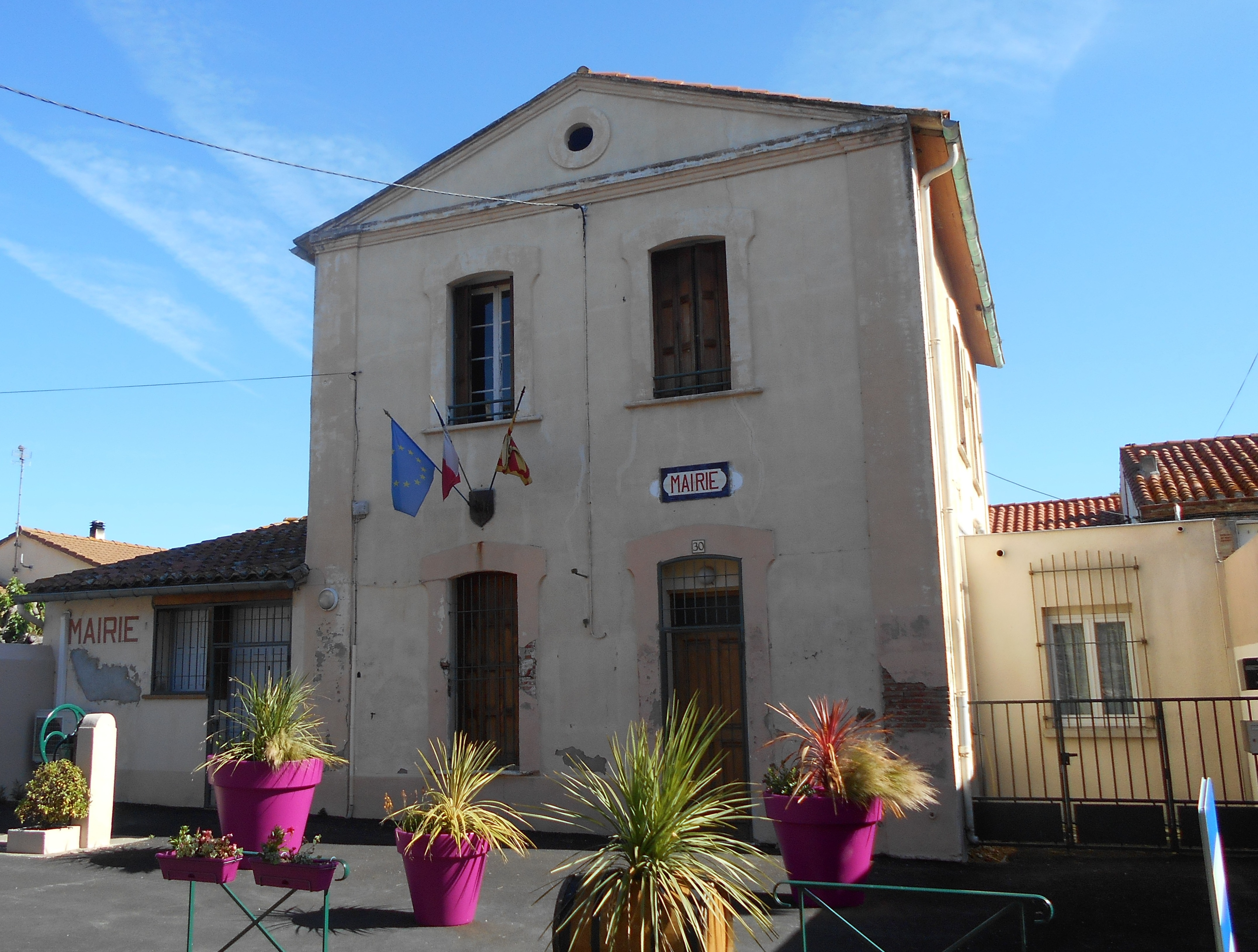 Unknown language: La Casa del Comú de Sant Joan la Cella